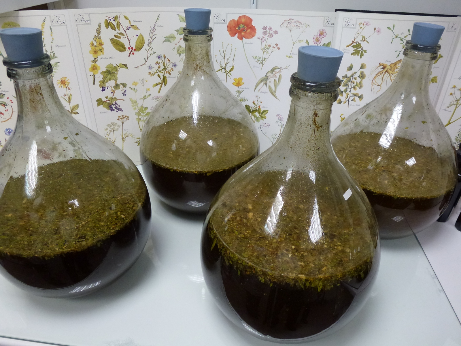 Les bonbonnes de verre assurent une qualité optimale lors de la macération de l'élixir du Suédois.